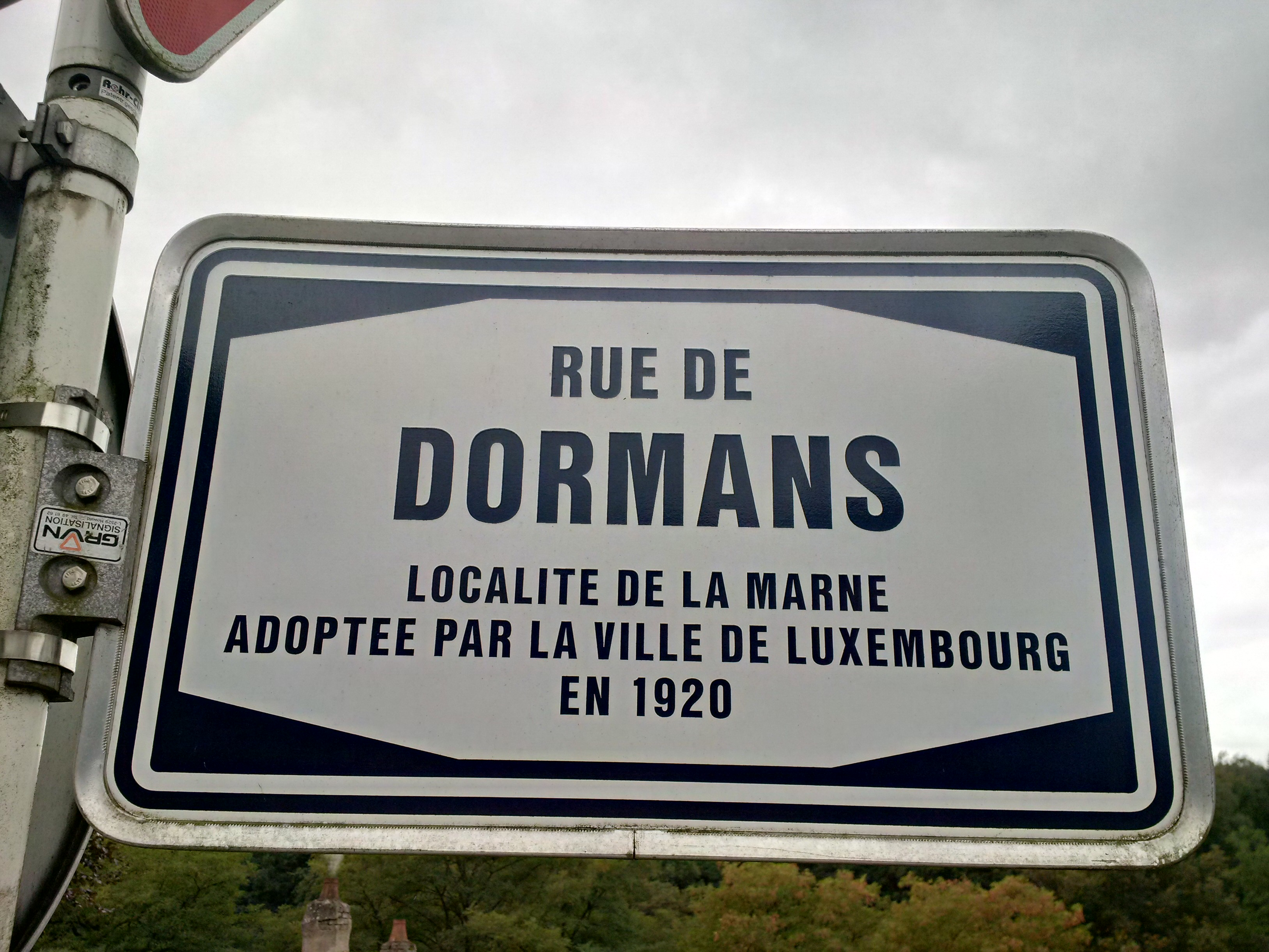 Stroosseschëld an der Stad Lëtzebuerg